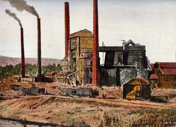 D'Metze Schmelz an den 1870er Joeren (spéider Arbed Esch-Schëffleng, haut ArcelorMittal). Zeechnung, waarscheinlech no enger zäitgenëssescher Foto. Erlabnes: De User:Zinneke krut de 16.02.2010 vum Patrick Jung, Auteur a Bedreiwer vum Site , d'Erlabnes, dëst Bild, mat Mentioun vun der Source, op d'Wikipedia eropzeluden.